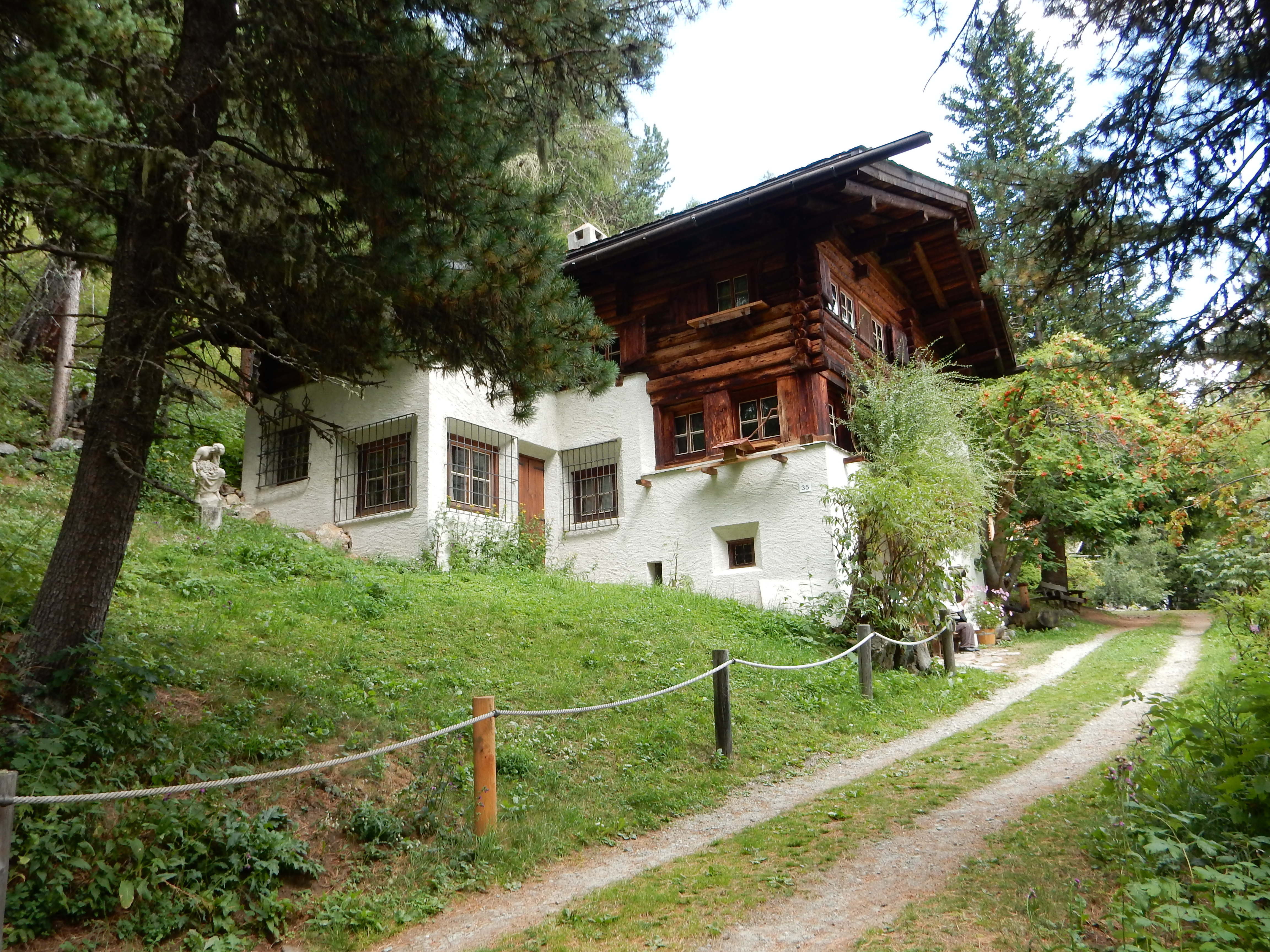 Mili-Weber-Haus: Haus im dem die Schweizer Künstlerin Mili Weber gelebt und gewirkt hat (Gemeinde St. Moritz)